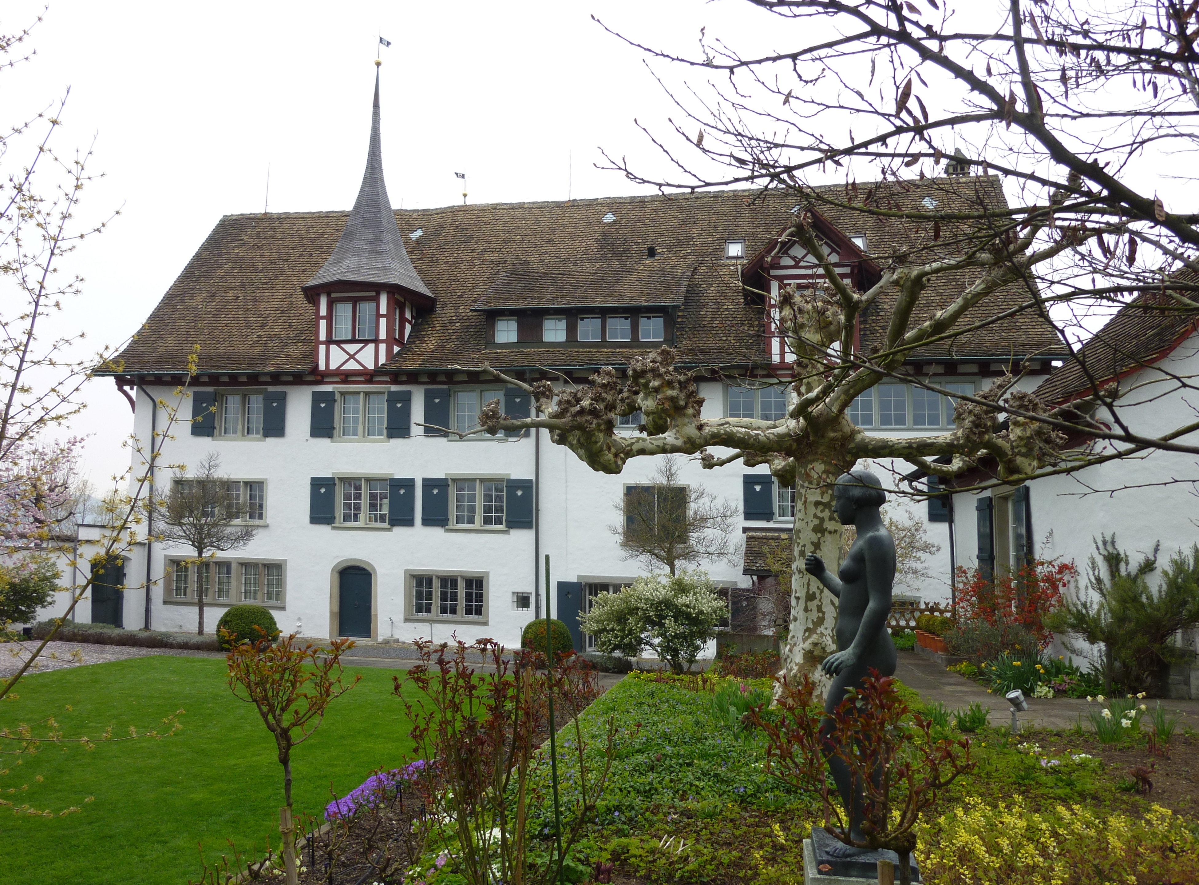 Traubenberg (Zollikon): Ansicht von Süden